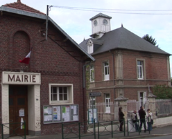 vue école et Mairie de Therdonne (version réduite)